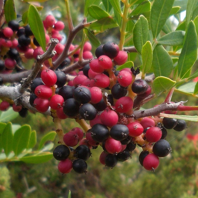 Taqbaylit: Photo des fruits